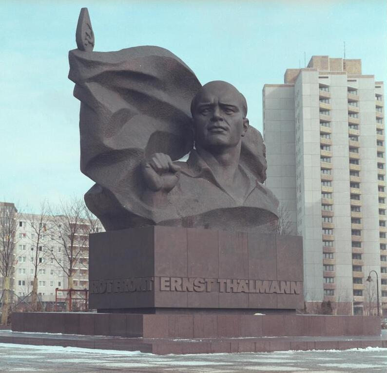 ADN-ZB/Franke/14.4.86 Berlin: Der Bildhauer Lew Kerbel schuf das Denkmal des grossen Arbeiterführers im Ernst-Thälmann-Park.